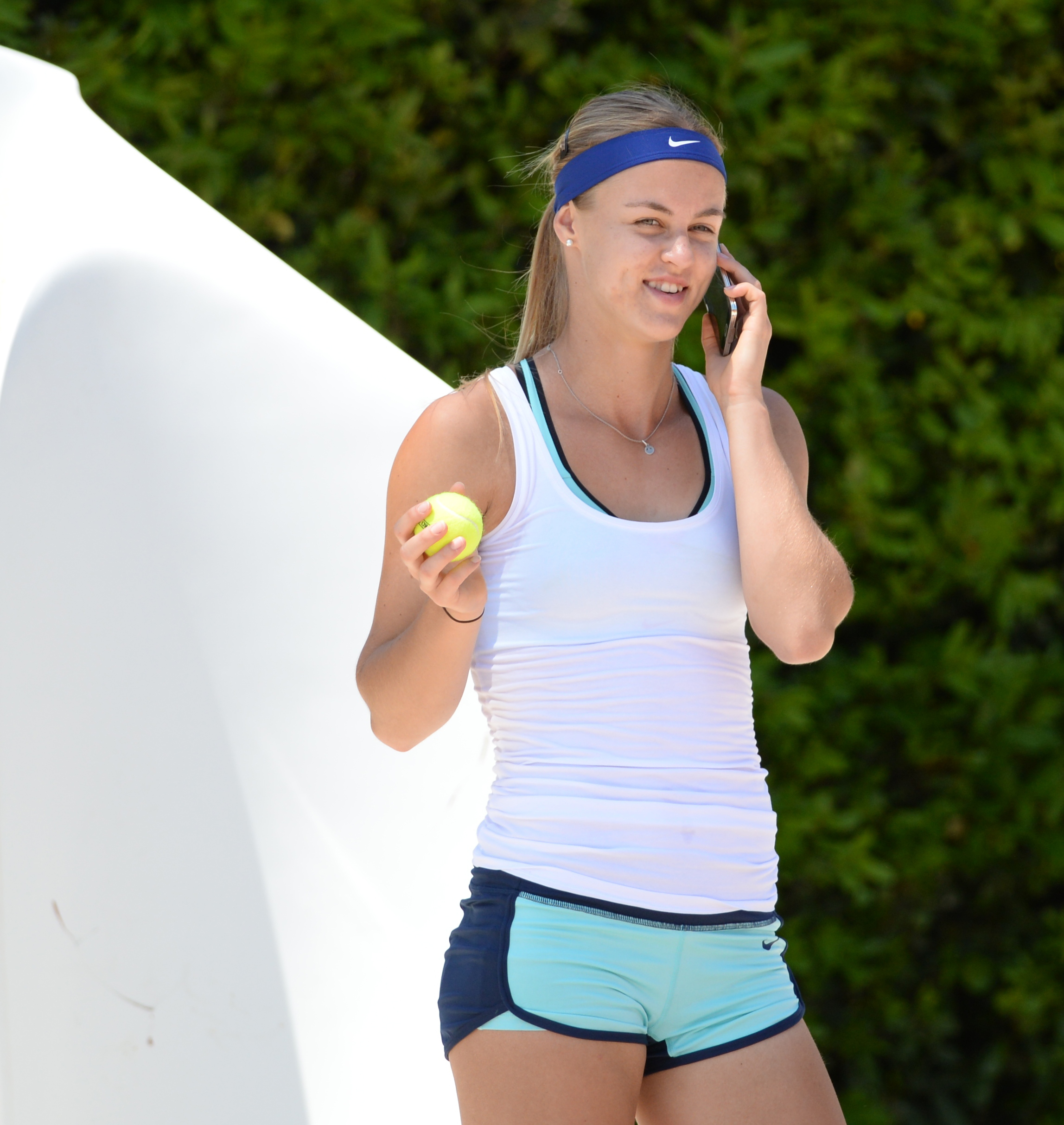 Anna Karolina Schmiedlova